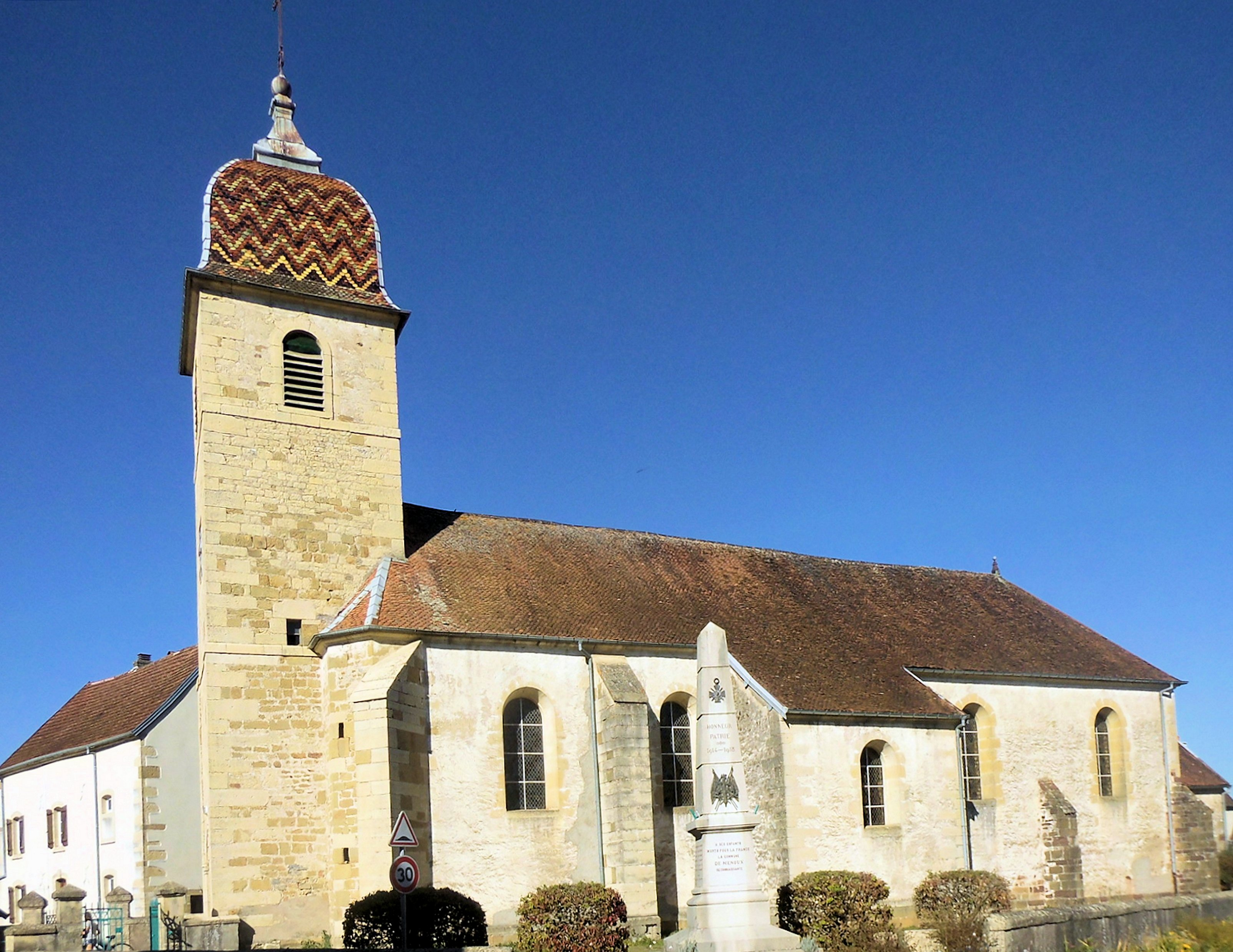 L'église Saint-Julien de Menoux